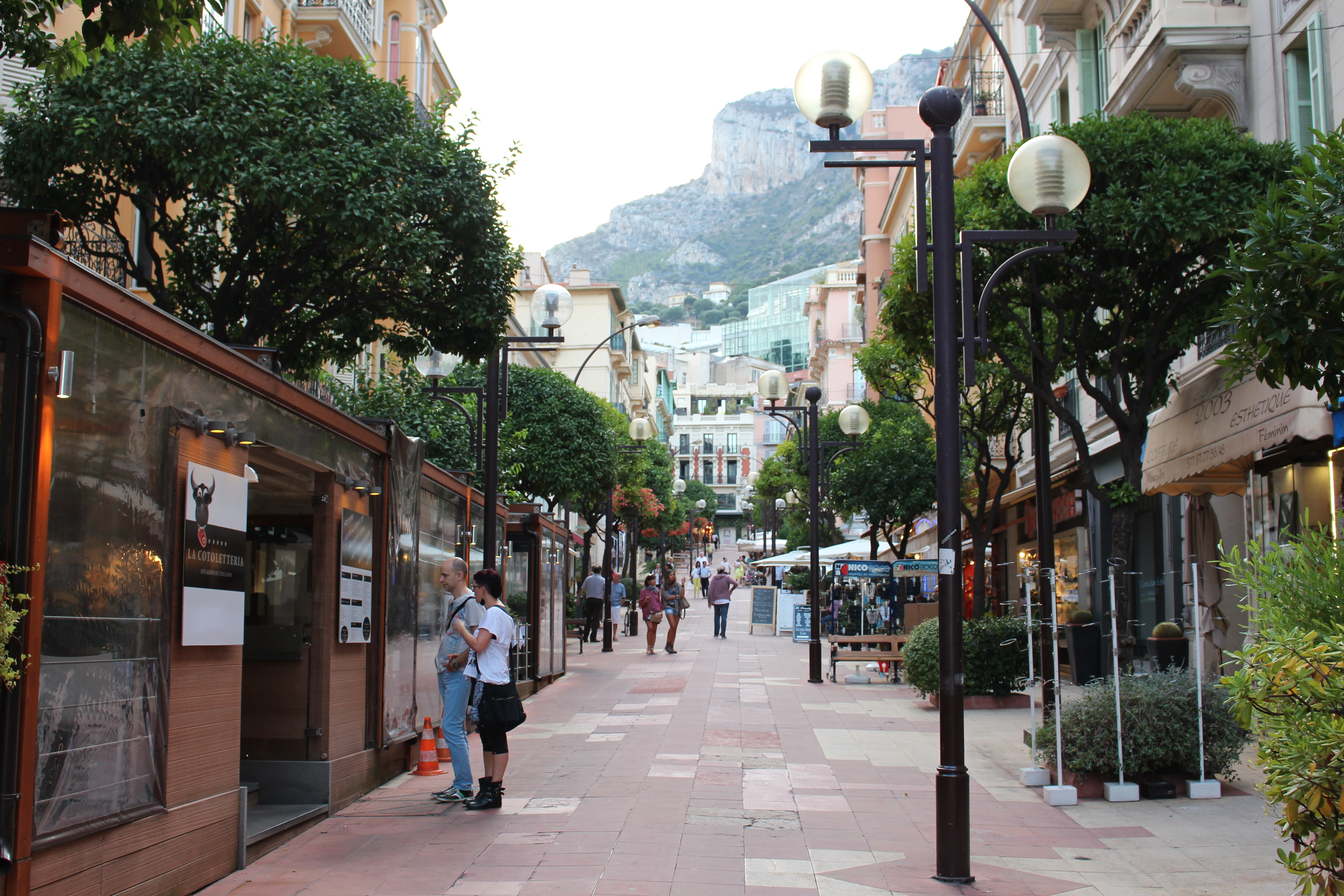 Ла-Кондамин. На ул. Принцессы Каролины.